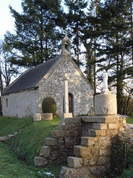 Chapelle Saint-Eustache à Saint-Étienne-en-Coglès (35).